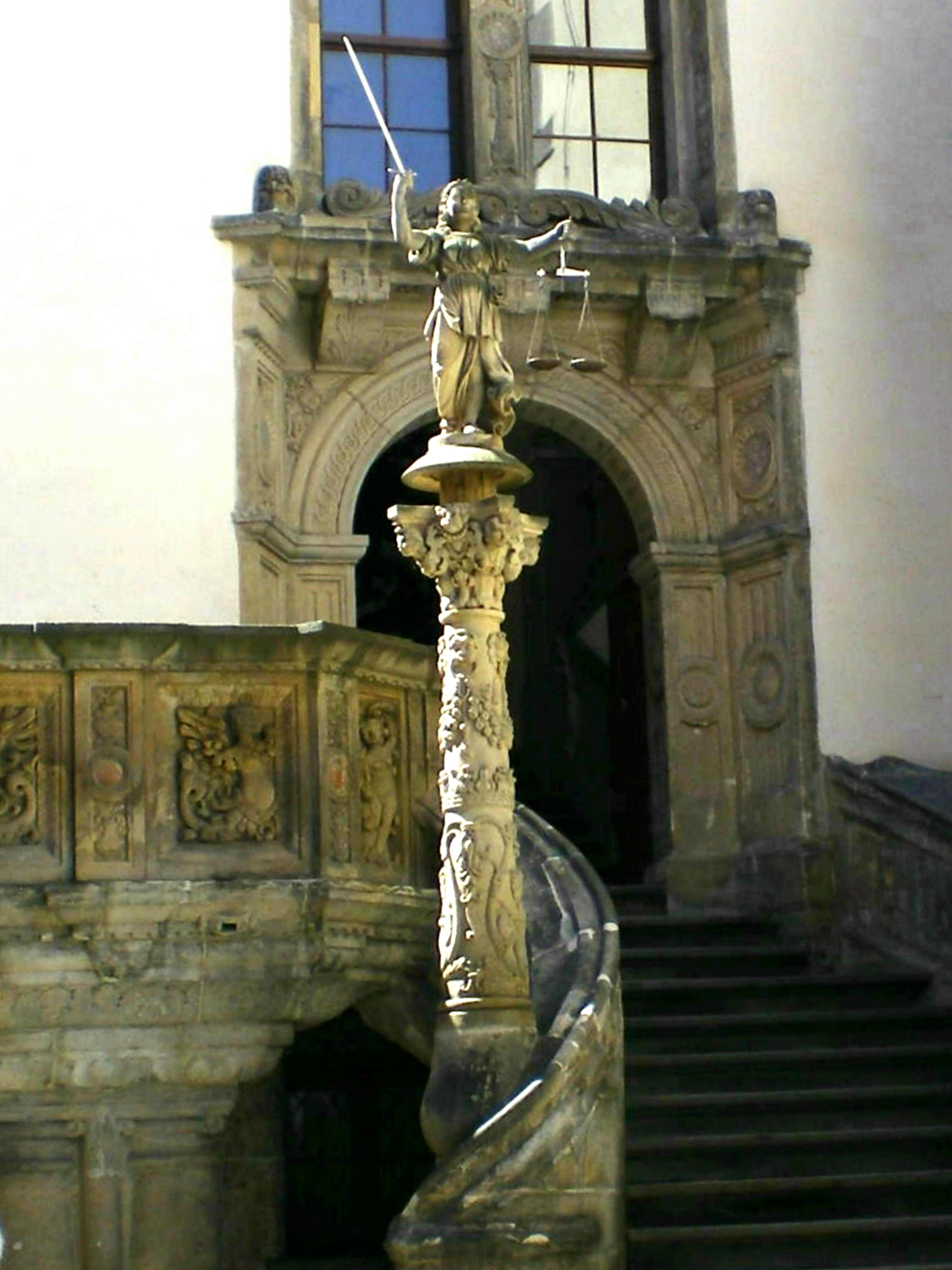 Görlitz, altes Rathaus: Bildhauer Andreas Walther III 1591: ornamentierte Sandsteinsäule mit dem Standbild der Justitia ohne Augenbinde am alten Rathaus in Görlitz.